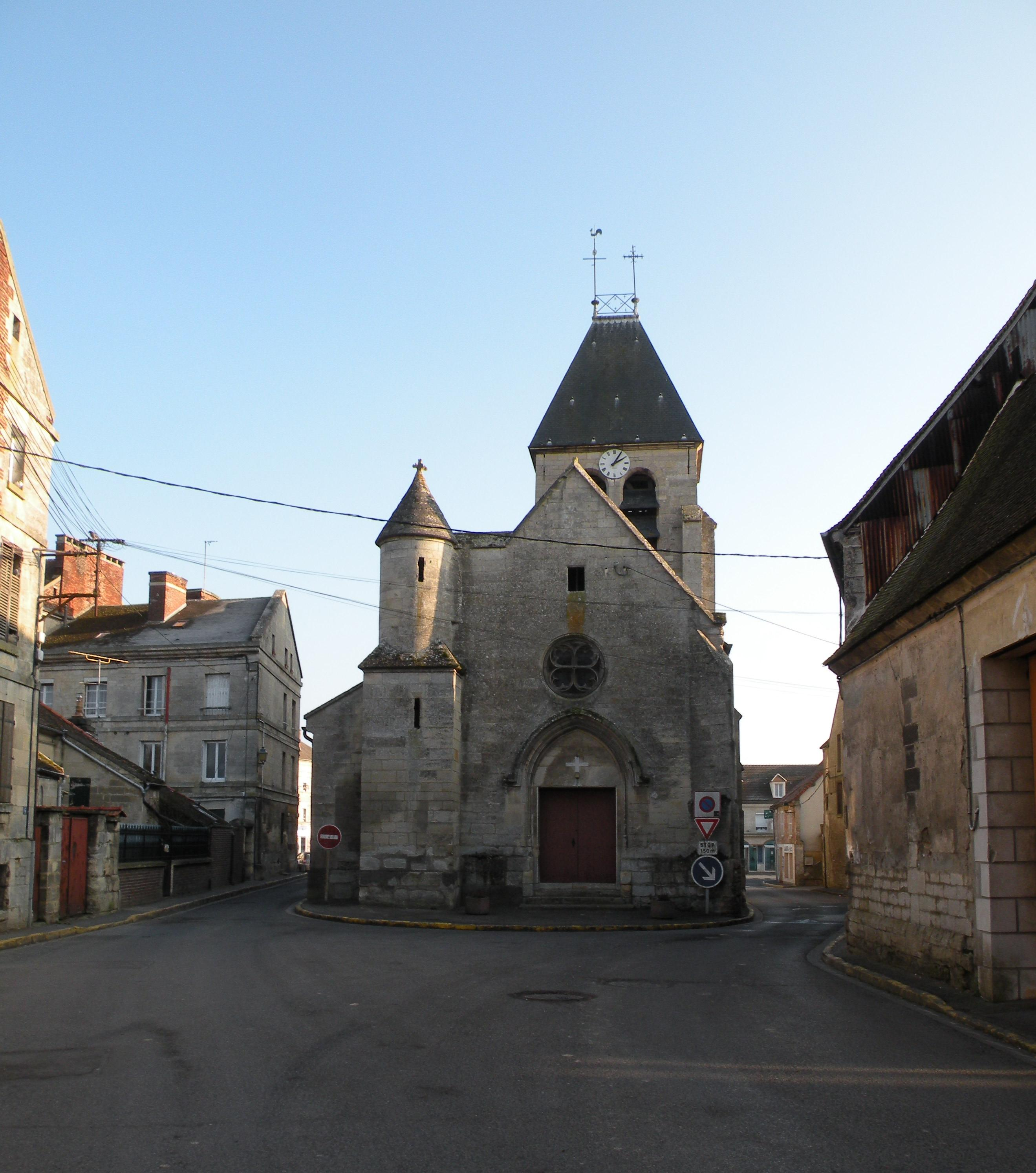 église de la commune de Neuilly-en-Thelle, oise france